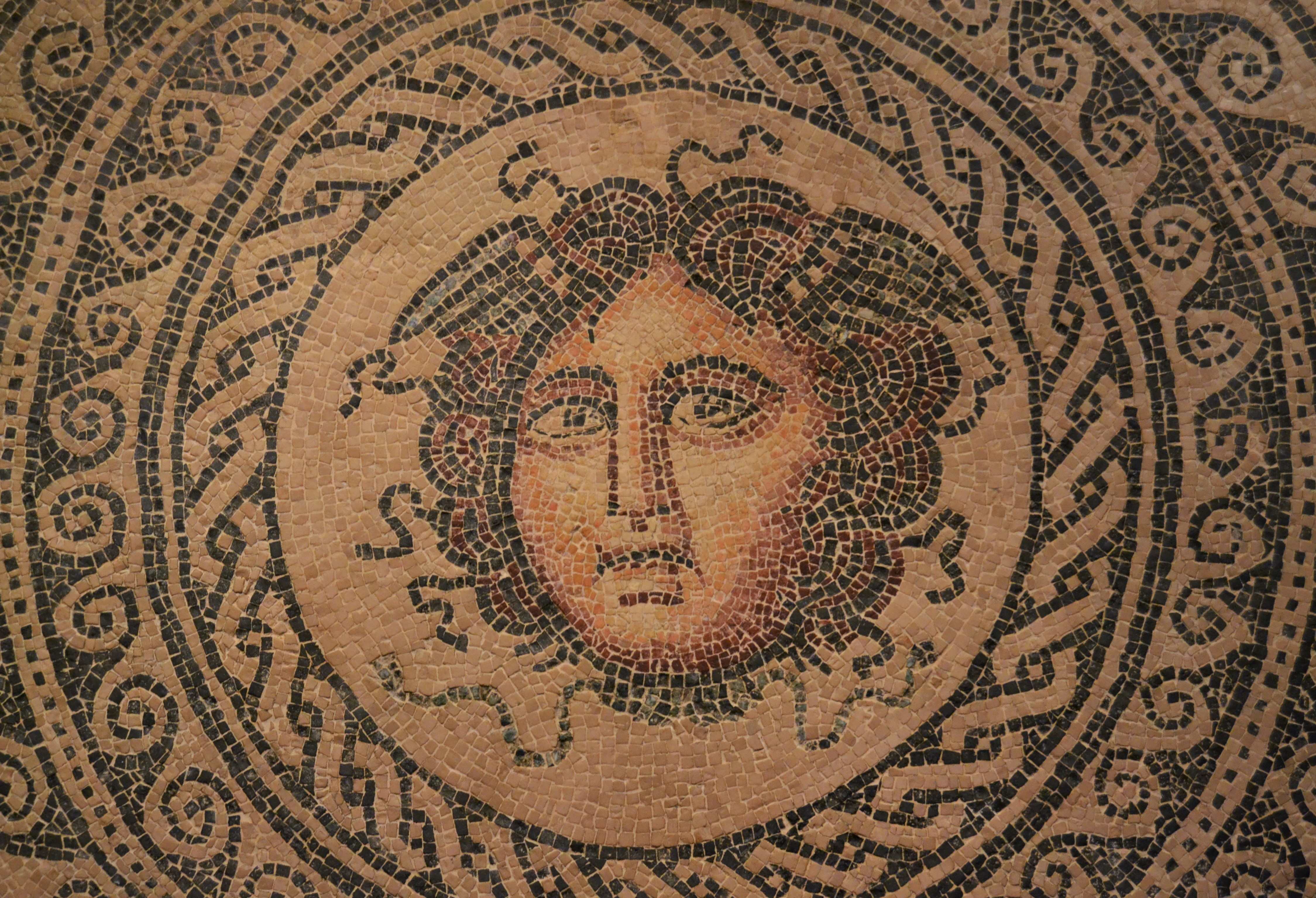 Museu d'Història de València, detall del mosaic de la Medusa.